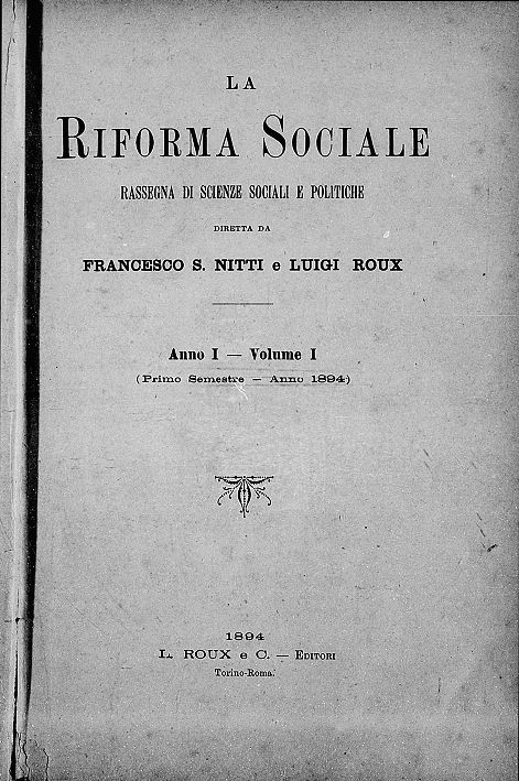 Frontespizio del periodico La Riforma Sociale, a. 1, n. 1